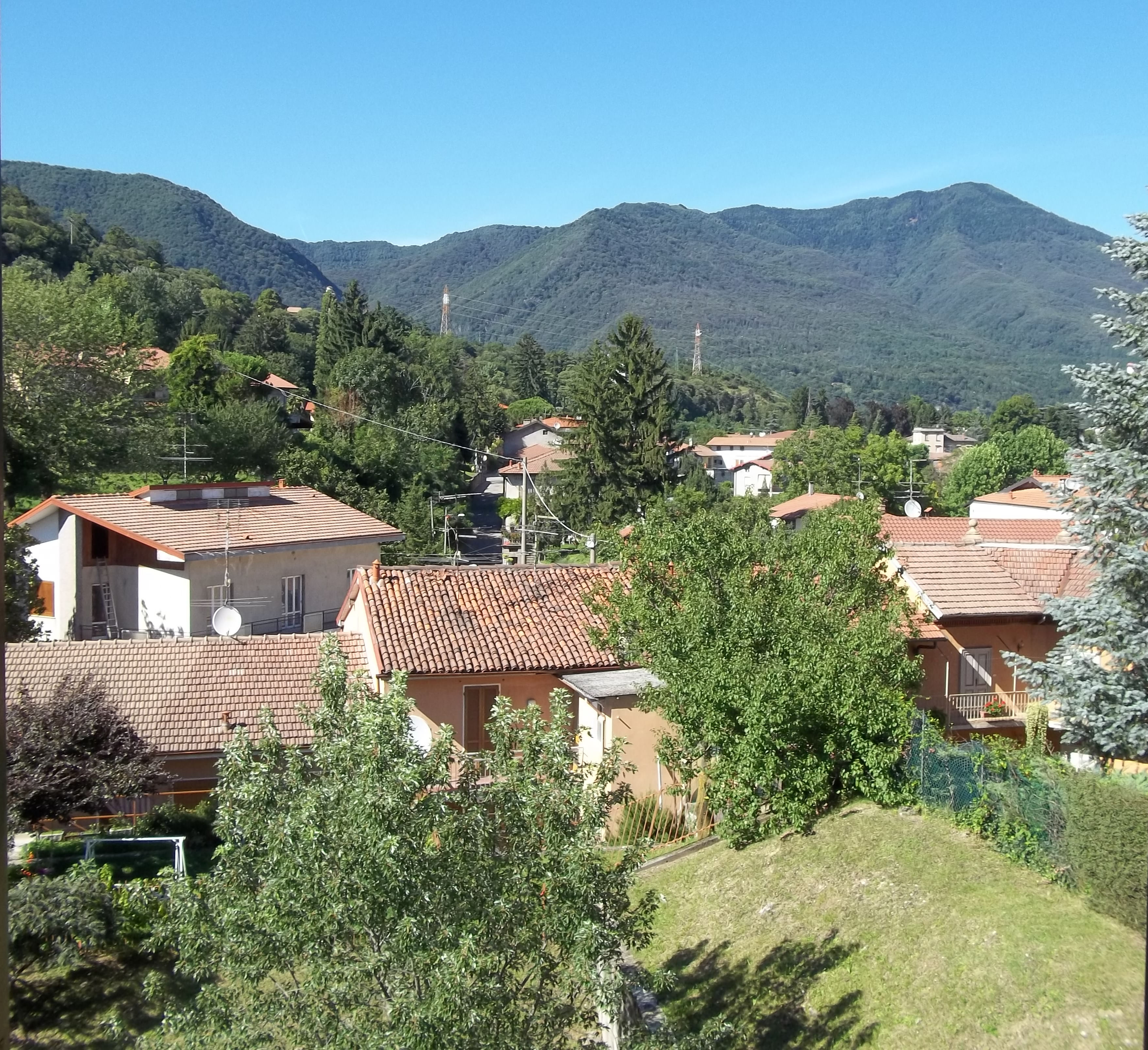 Interlingua: Caravate- Scorcio di paesaggio